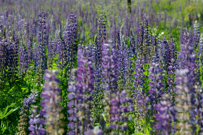 Łubin trwały (Lupinus polyphyllus).